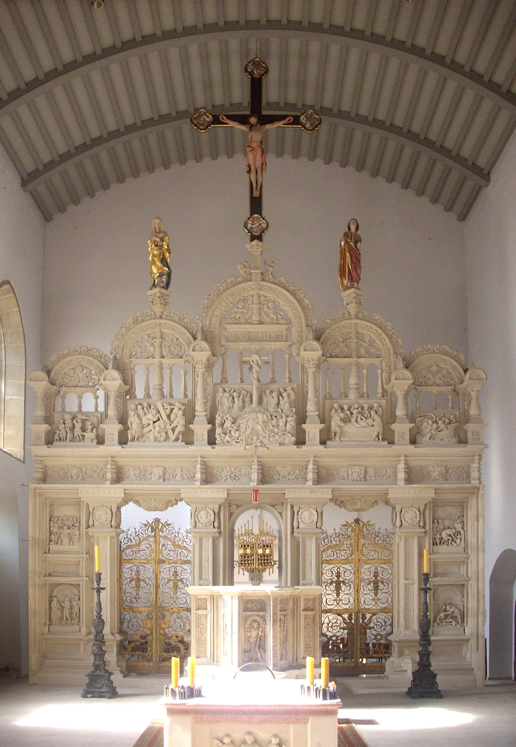 Hildesheim, Antoniuskirche am Domkreuzgang, Domlettner von Johann Brabender (1546)